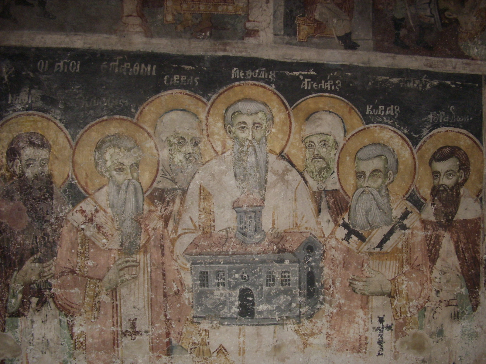 Svätí Sedempočetníci (tiež Sedmopočetníci, Sedmočislenici, Siedmi svätí) je súhrnné označenie pre sv. Cyrila a Metoda a ich najvýznamnejších žiakov, svätých Gorazda, Klimenta (Ochridského), Nauma (Ochridského), Sávu a Angelára. Poslední štyria menovaní pochádzali kmeňov južných Slovanov, viacerí bulharskí historici však tvrdia, že nielen Gorazd ale aj Kliment pochádzal z Veľkej Moravy. Zľava: Naum, Kliment, Sáva, Metod, Angelár, Cyril, Gorazd